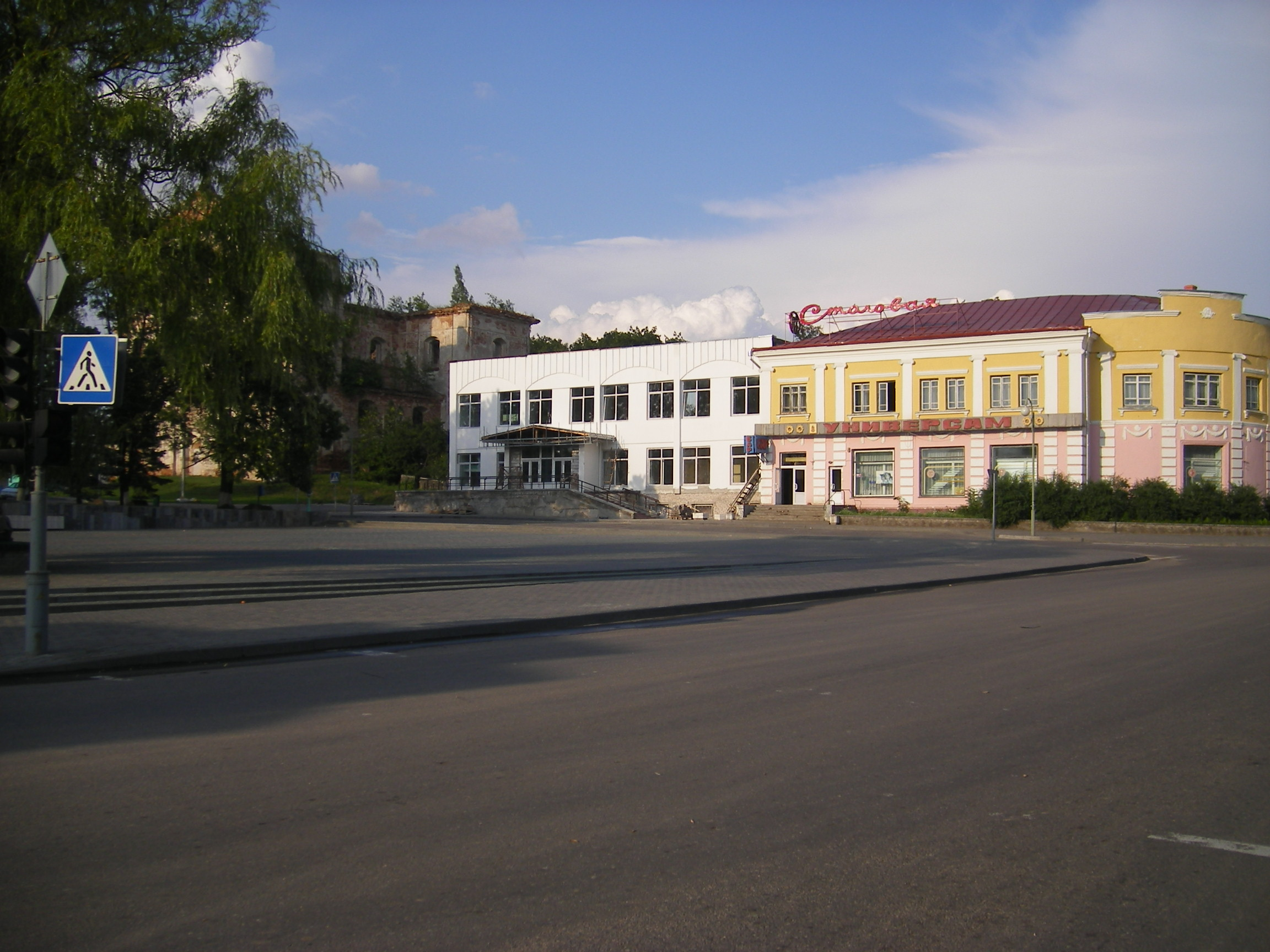 Vyalikaya Berastaitsa, Main Square